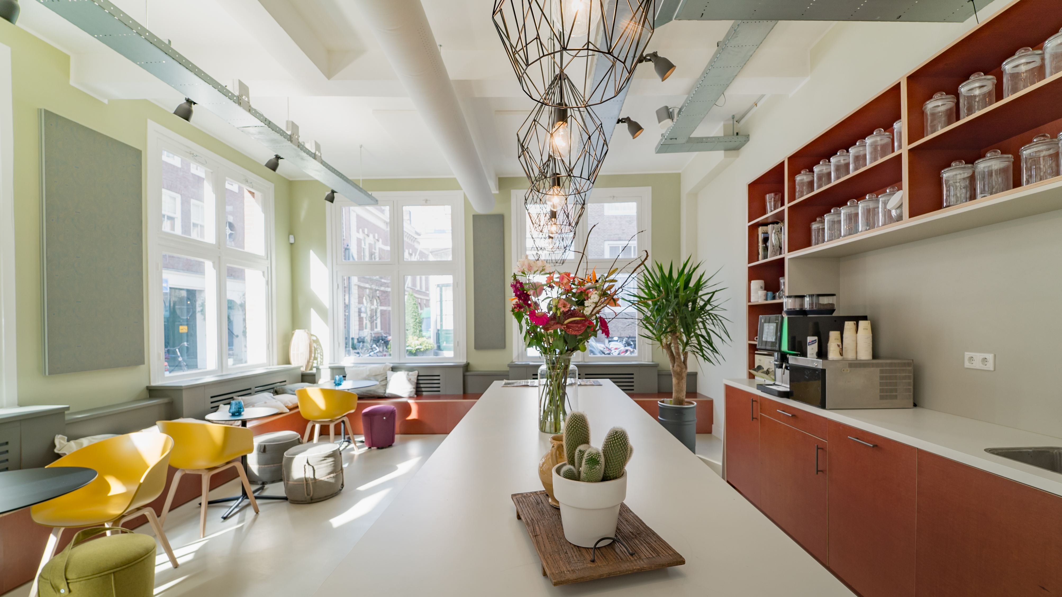 Kantoor Zoover Amsterdam